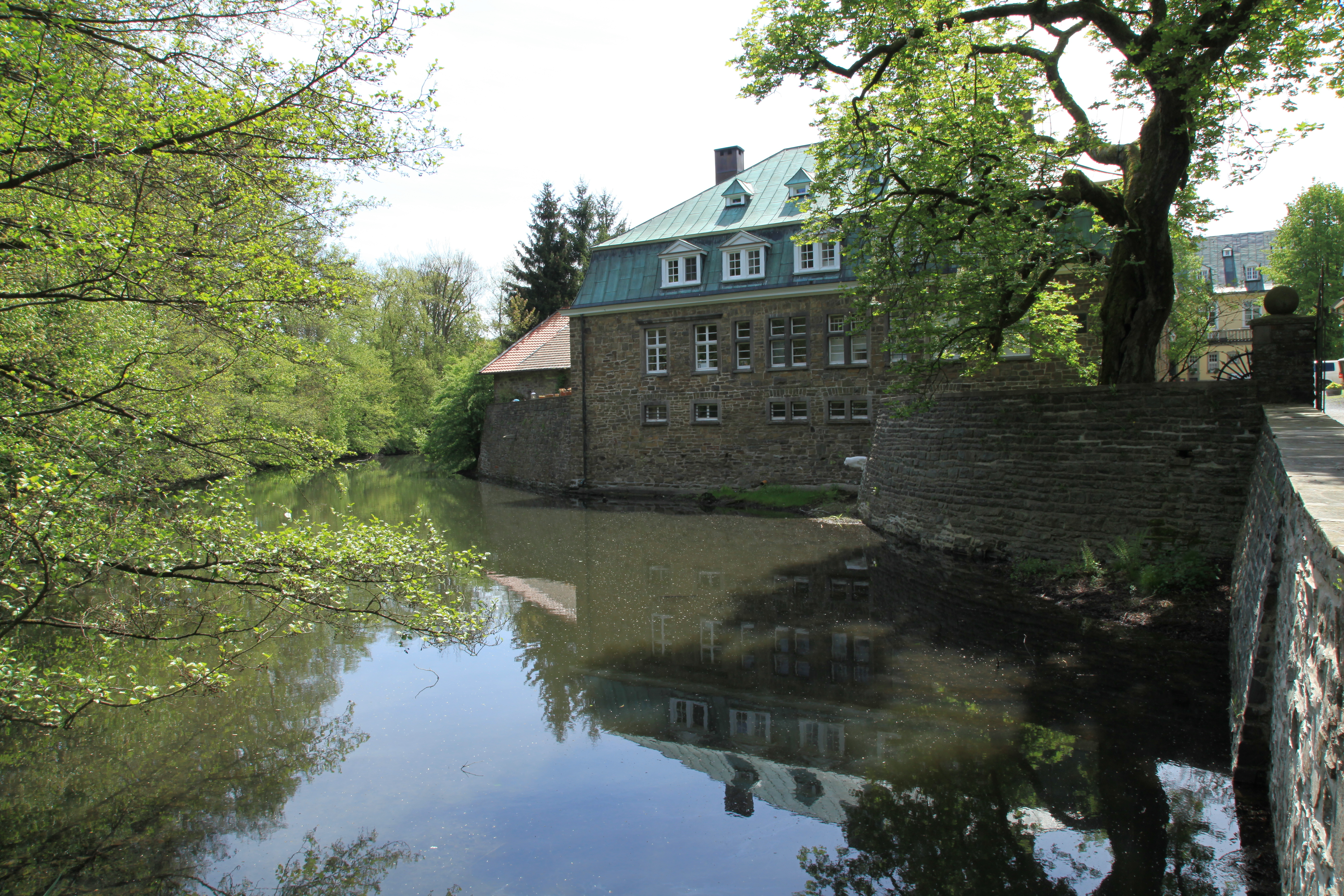 Haus Rhade, Alter Mühlenweg in Kierspe-Rhadermühle